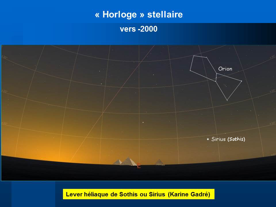 Lever héliaque de Sirius (Sothis en égyptien). Photo montage.